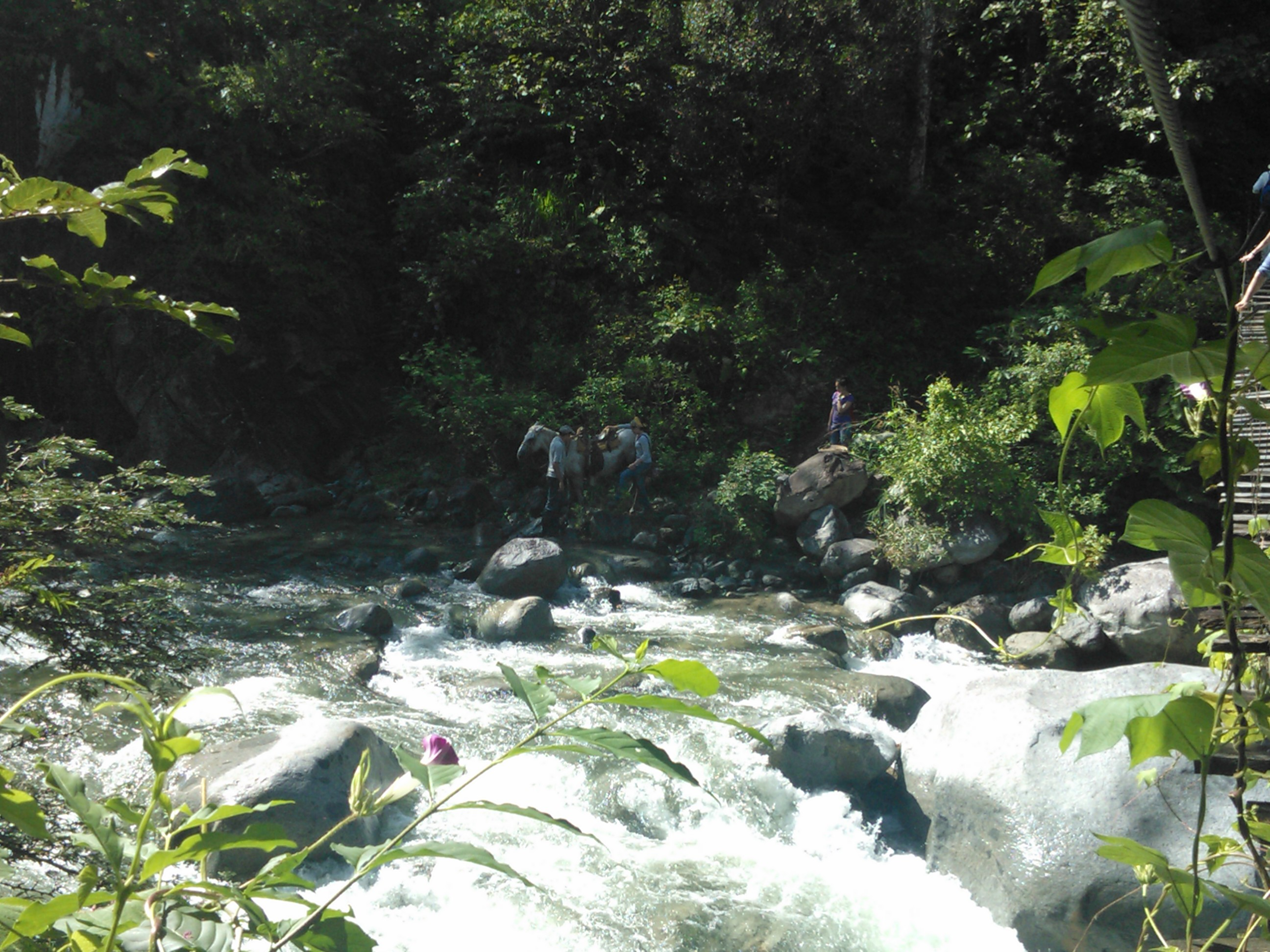 Fotografía del río que alimenta al sistema silvopastoril en el ejido Unión Pijijiapan. Se implementó este sistema para eficientar producción ganadera en la parte alta de la cuenca del río Coapa, en Pijijiapan, Chiapas.